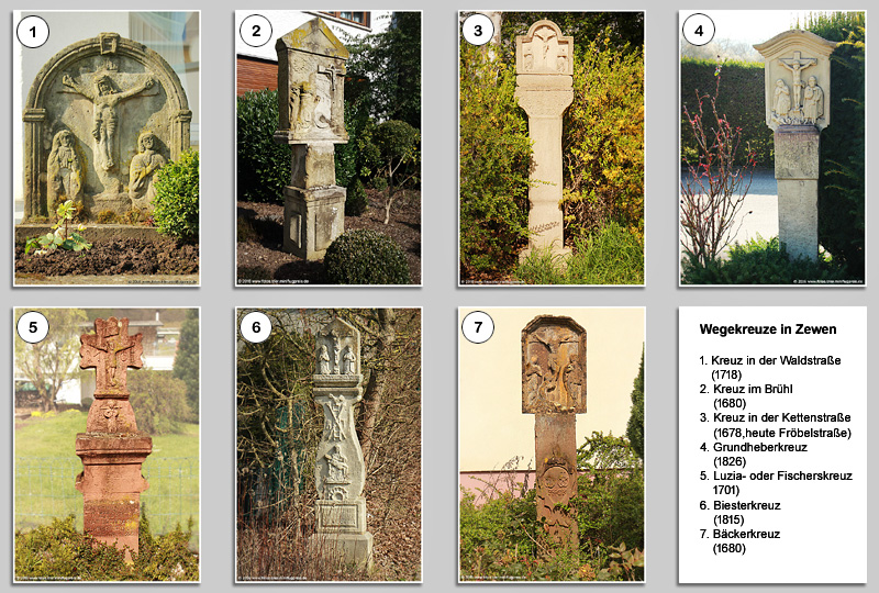 Zusammenstellung der sieben Zewener Wegekreuze